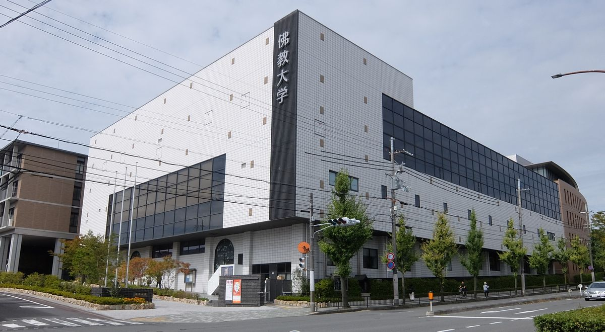 佛教大学紫野キャンパス（京都市北区）。正門・鷹陵館を南東側から見る